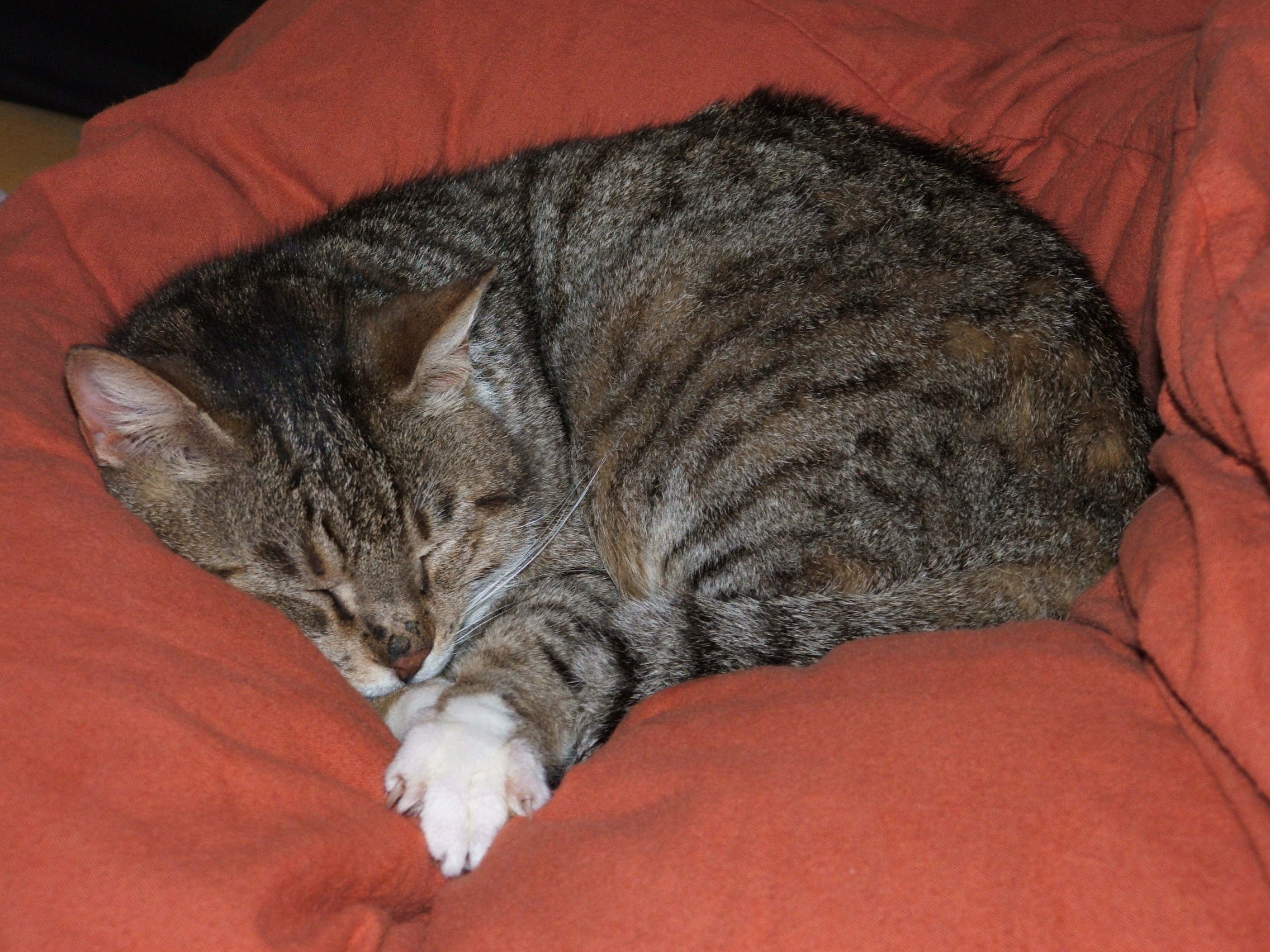 החתולה מיציבוץ מקיבוץ בית אורן